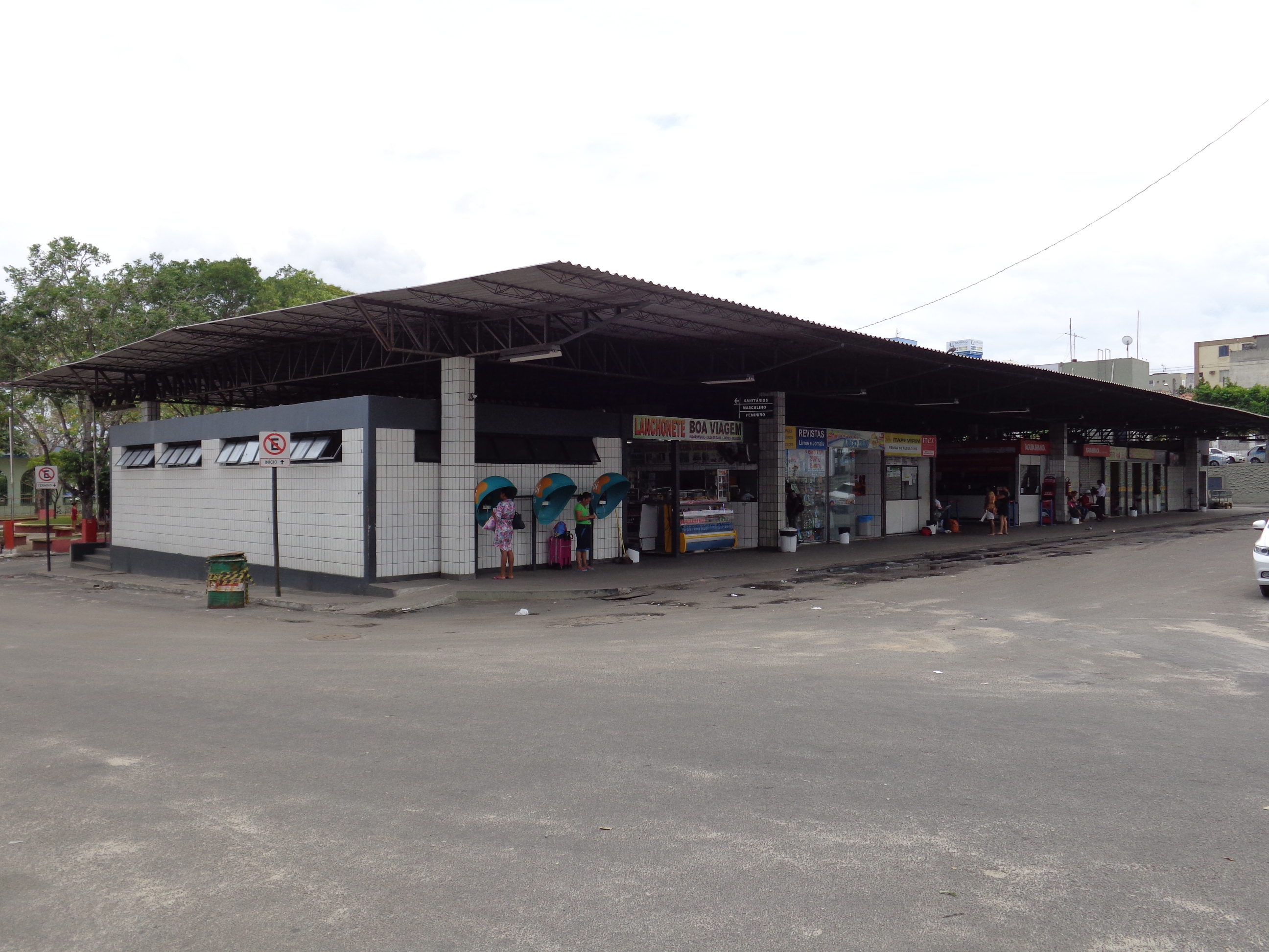 Terminal Rodoviário da Águia Branca em São Mateus-ES